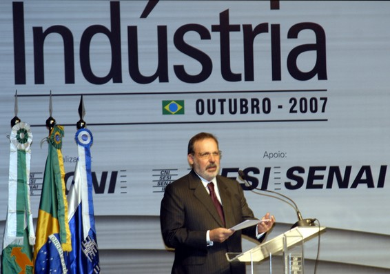 O presidente da CNI, Armando Monteiro Neto, discursa durante o 2º Encontro Nacional da Indústria, que vai discutir temas como licenciamento ambiental, Lei Geral, politicas e programas de apoio às micros e pequenas empresas, as reformas.